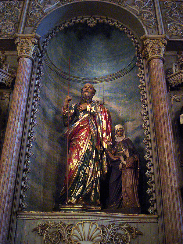 Interior da Igreja de Nossa Senhora da Conceição, Porto Alegre, Brasil. Altar de São Joaquim